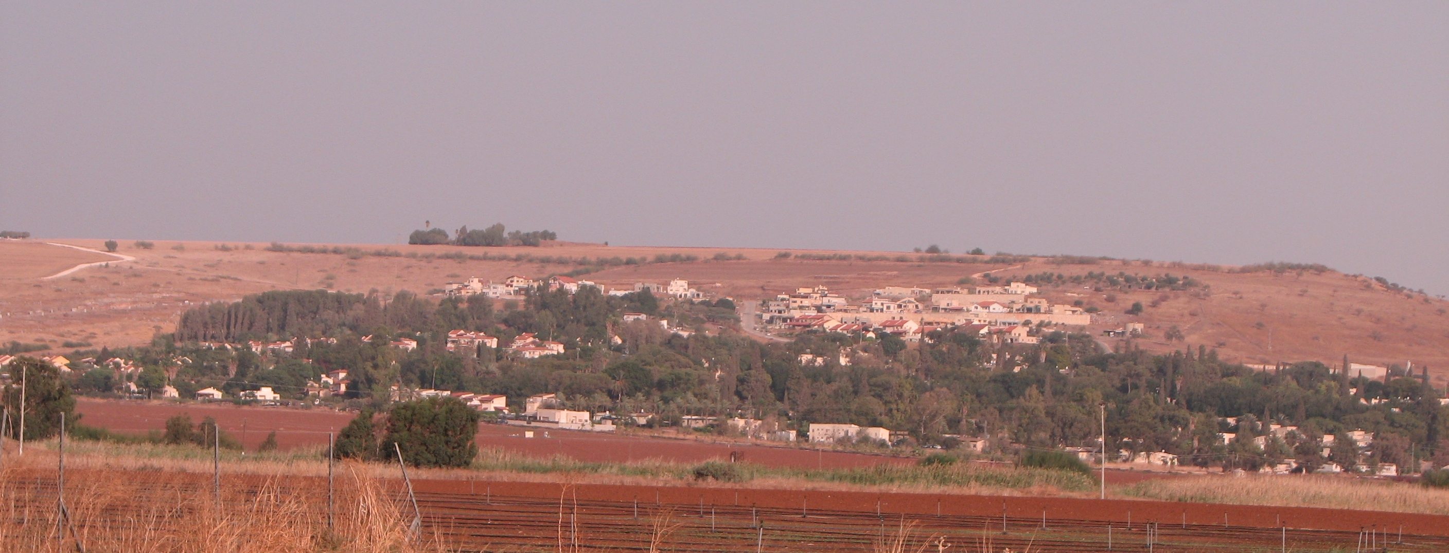 קיבוץ בית השיטה - מראה כללי